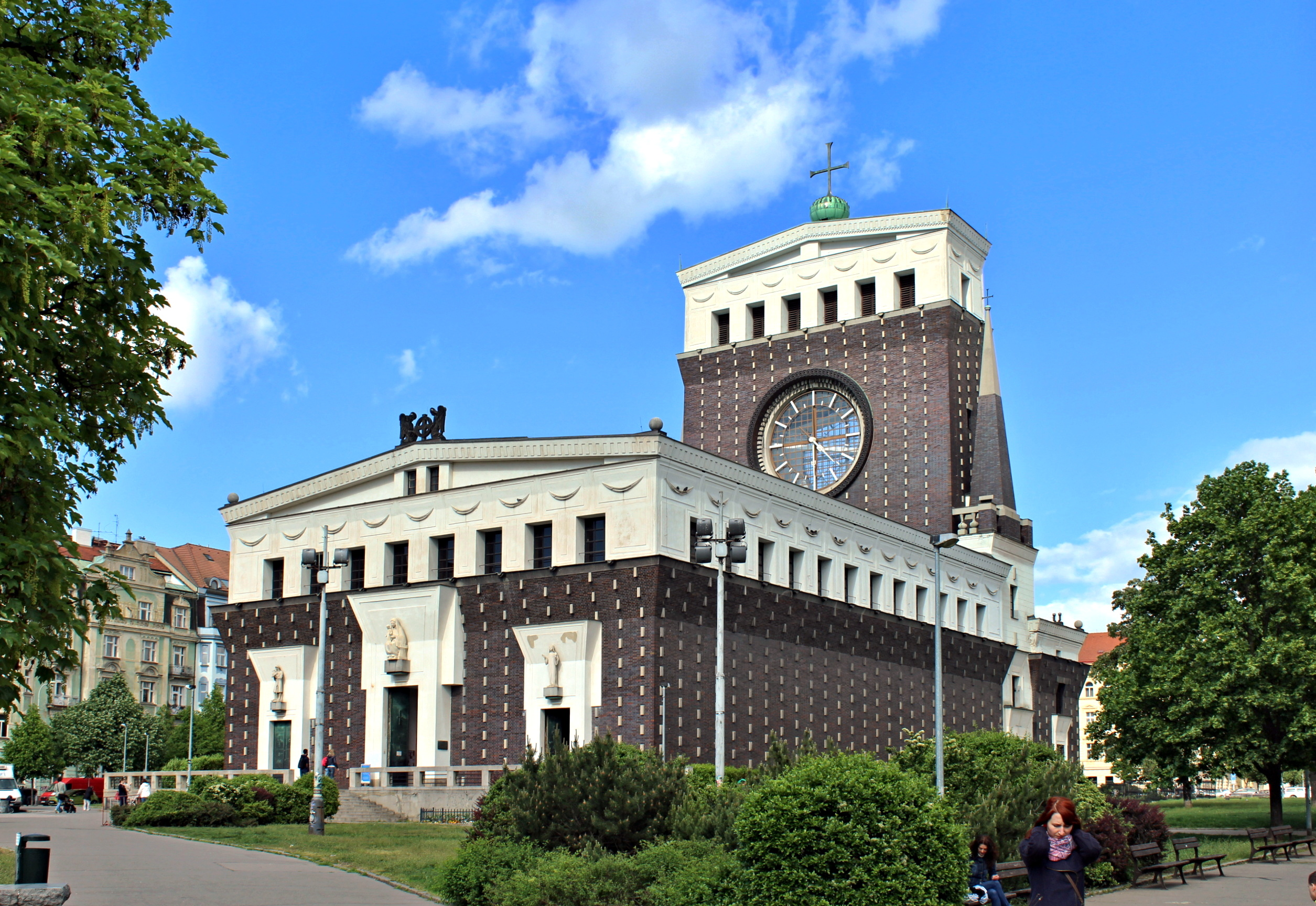 Náměstí Jiřího z Poděbrad